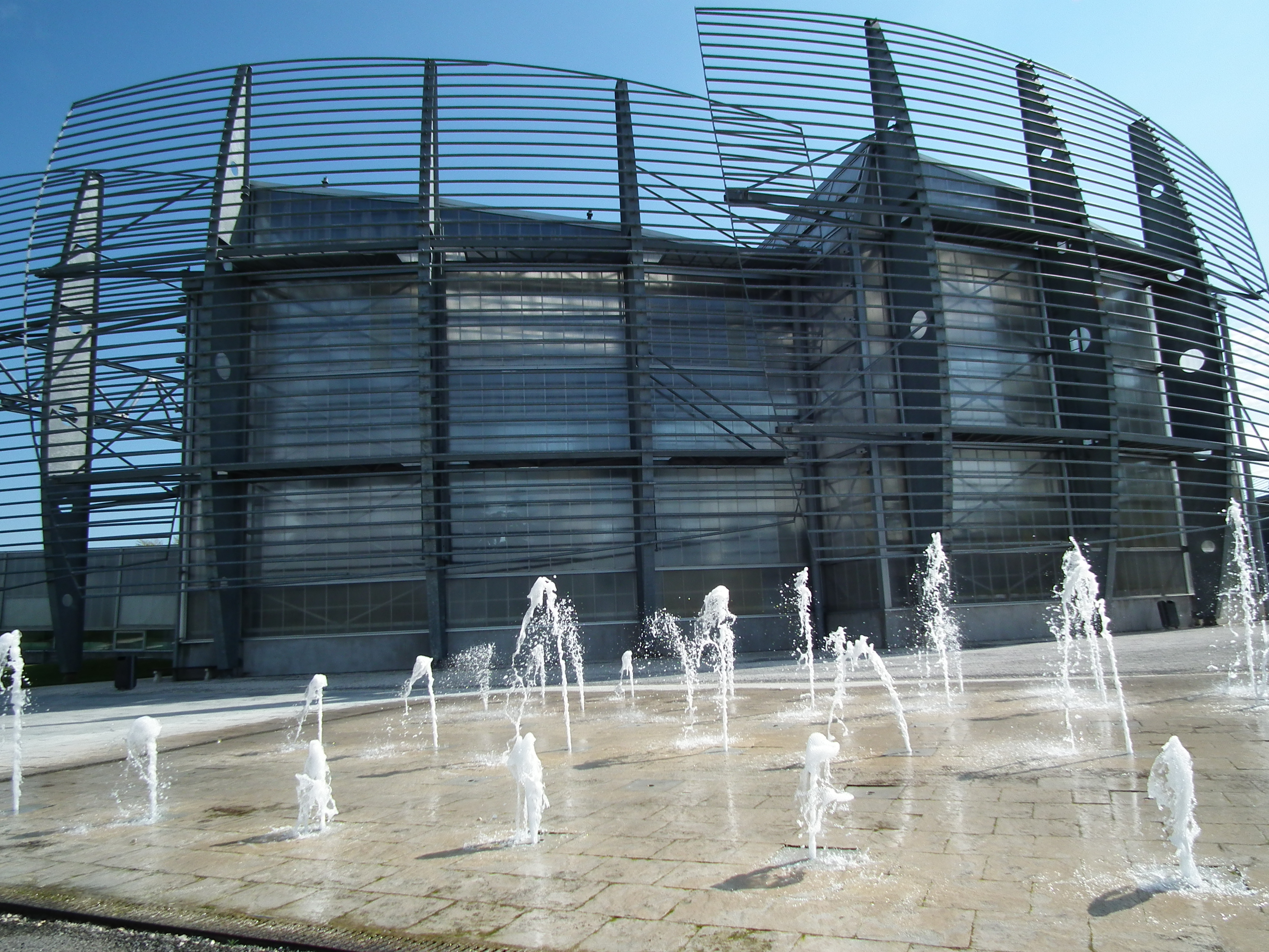 Photo du bâtiment principal des "les Jardins du Monde" de Royan vu de l'intérieur du parc avec au premier plan les jets d'eau de l'"Esplanade des eaux vives".